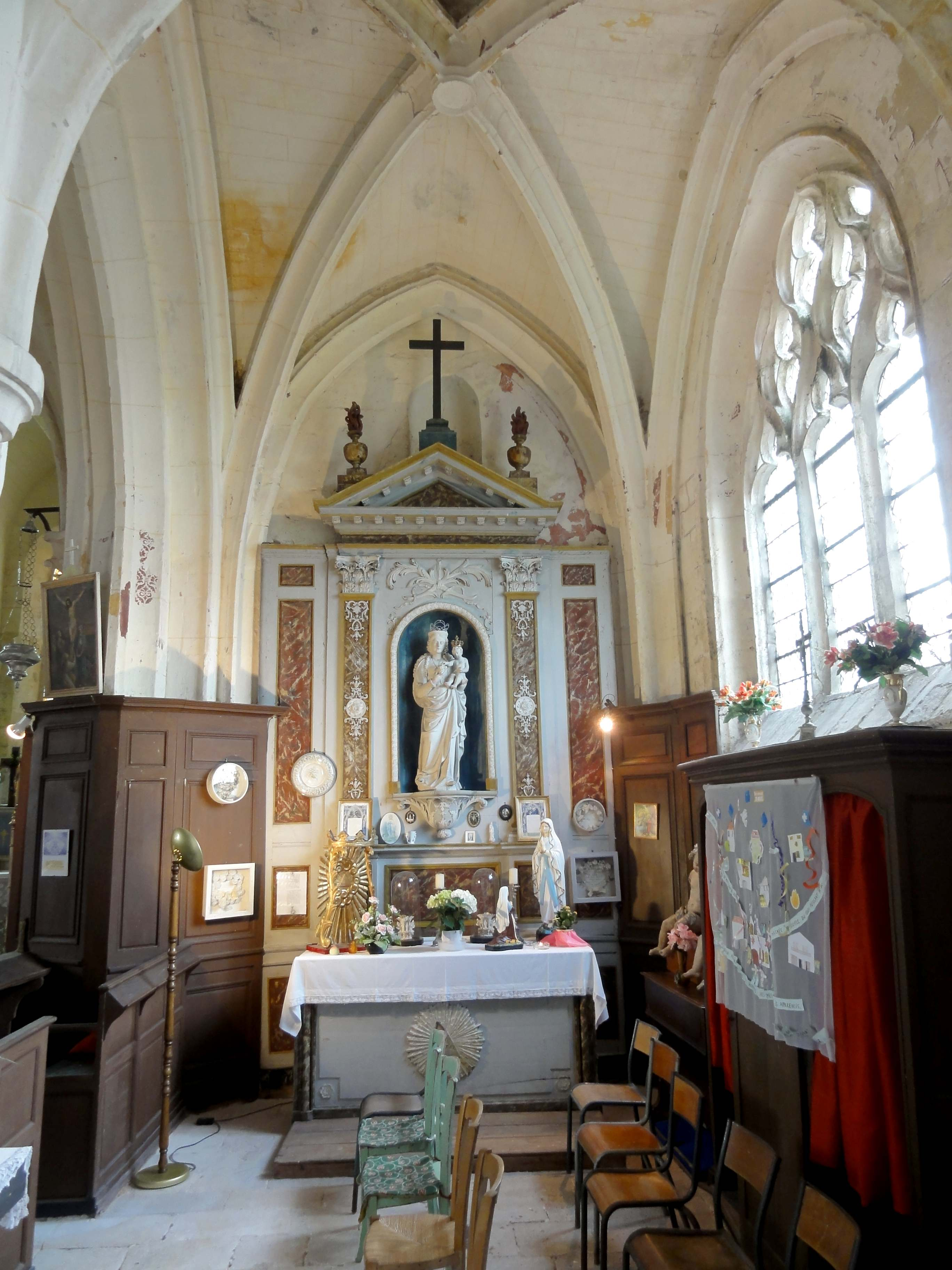 Intérieur de l'église - voir titre.